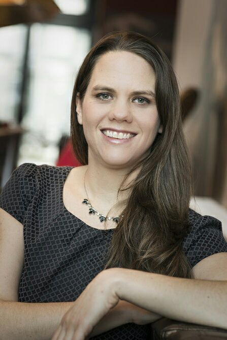 Portrait von Alana Falk.